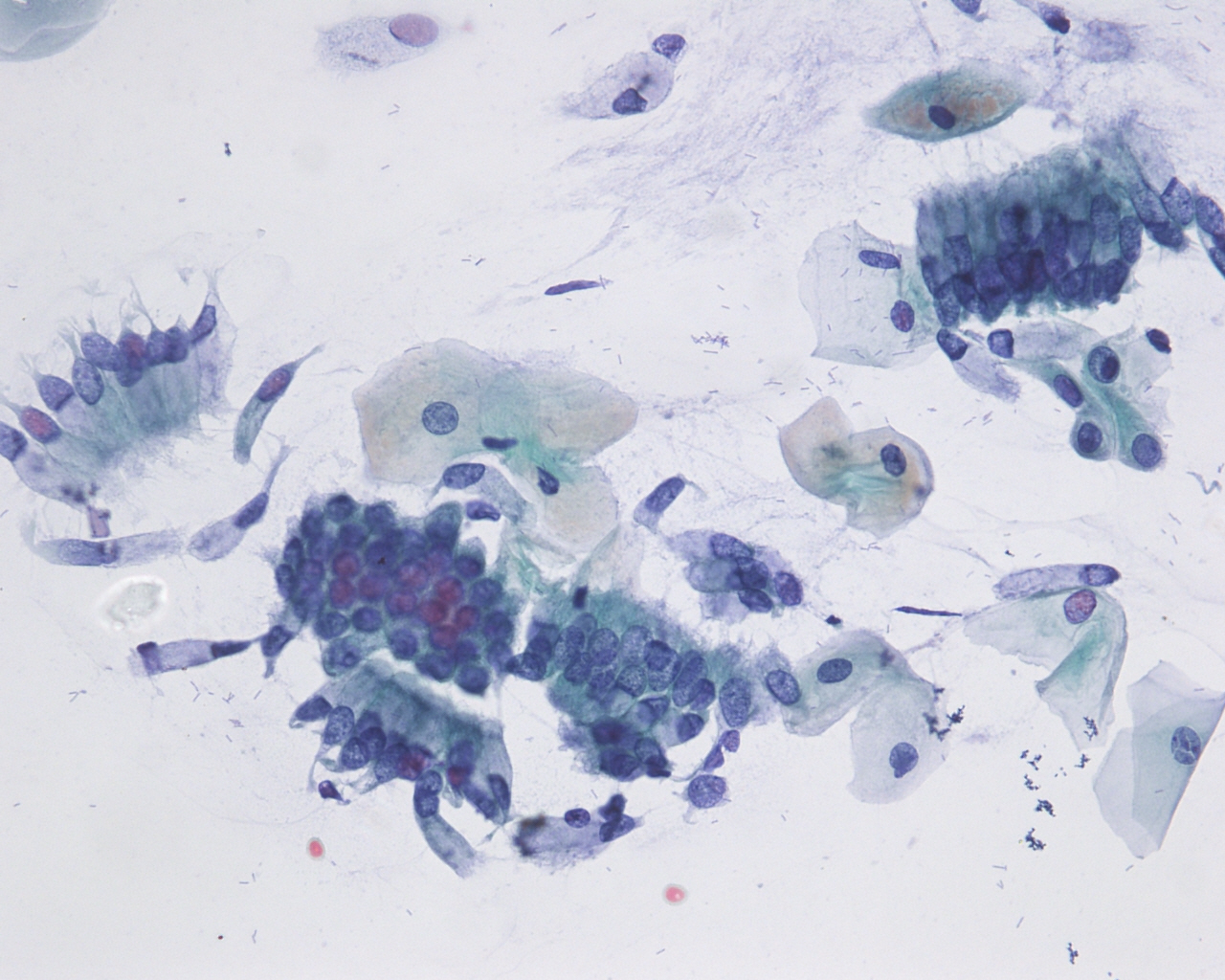 CELULAS ENDOCERVICALES